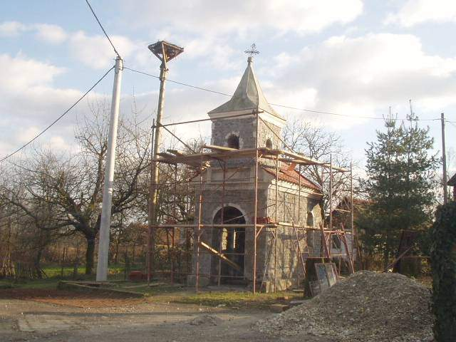 kapelica u izgradnji u Djivanu, 2006.g.